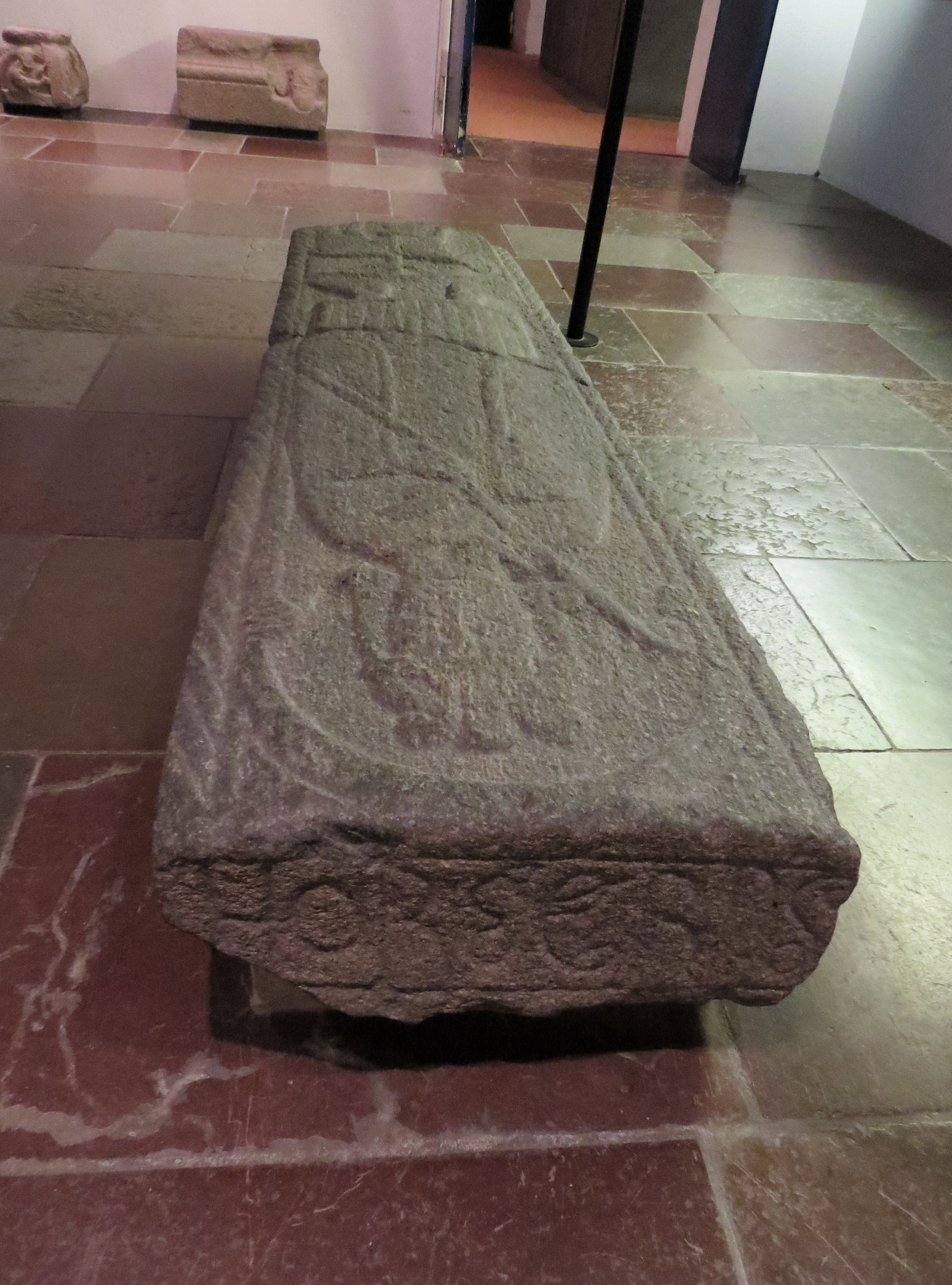 HORDERUS stenmesters navn på romansk gravstens ene kortside, granit, Gjesingholm (Løvenholm), Nationalmuséet, København